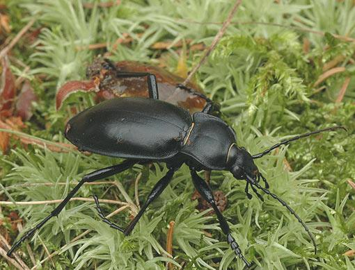 Carabus glabratus